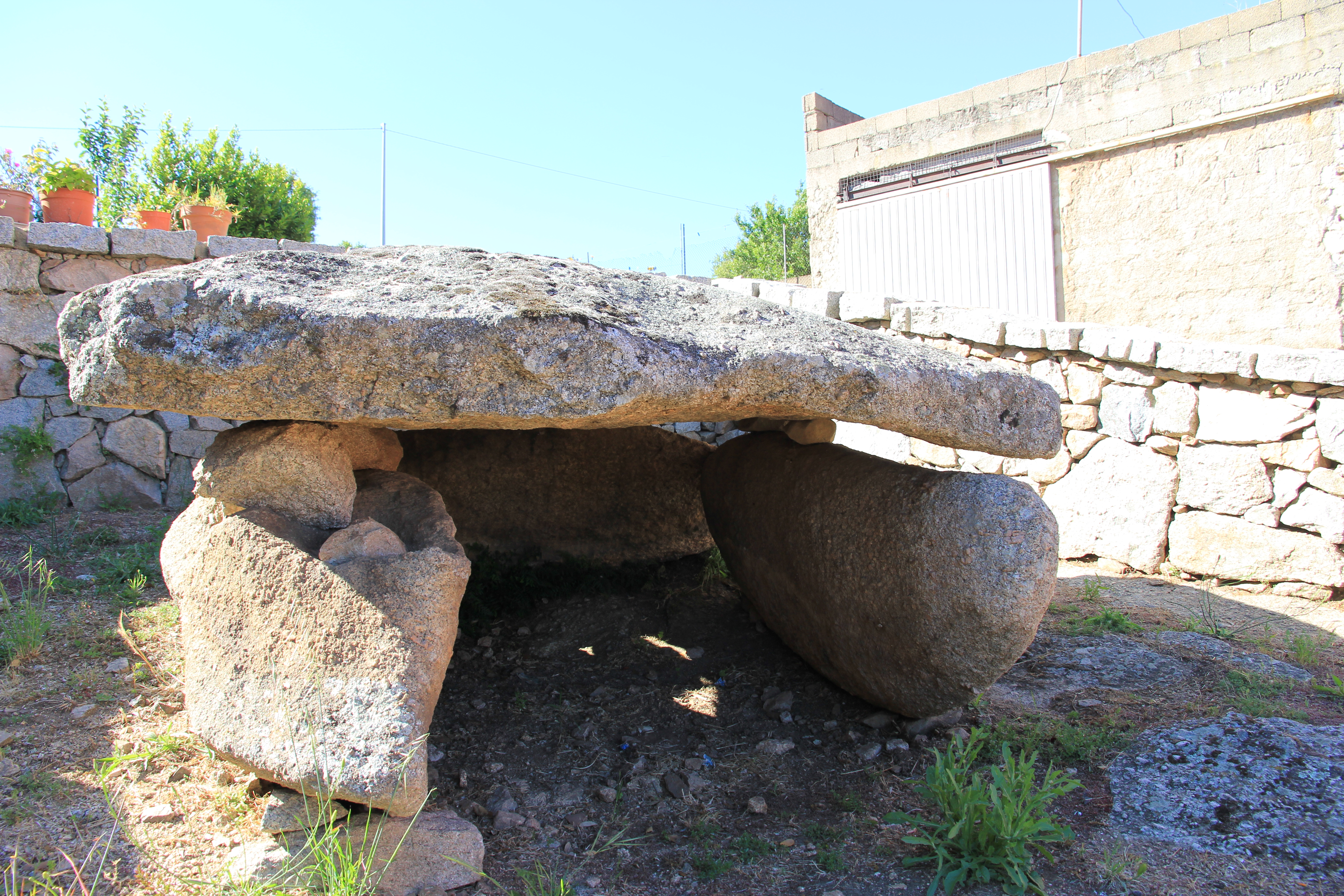 Luras - Dolmen di Alzoledda